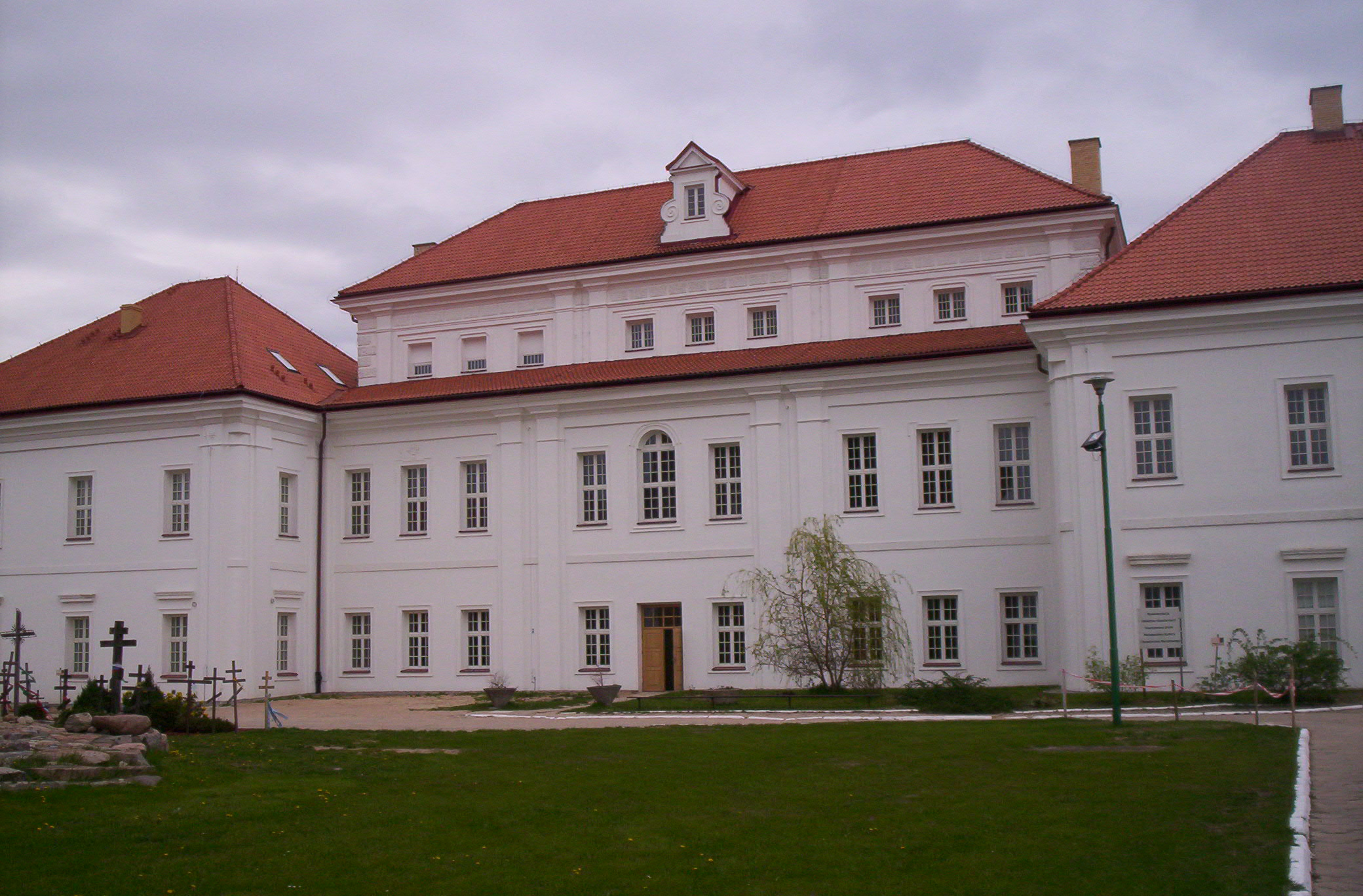 Supraśl - Pałac Archimandrytów w zespole klasztornym bazylianów